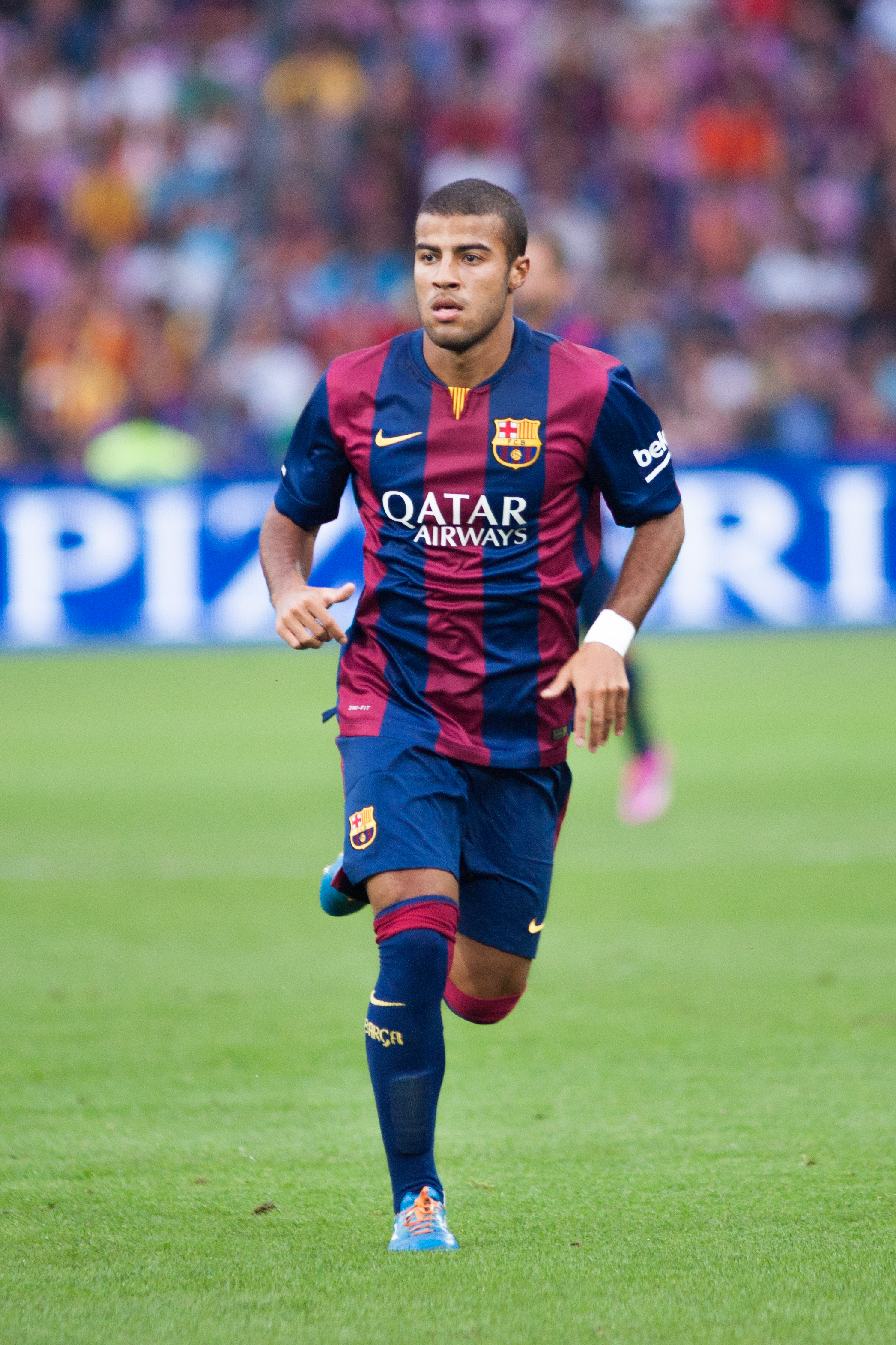 Naples vs Barcelone - Genève - aout 2014 - Rafael Alcántara